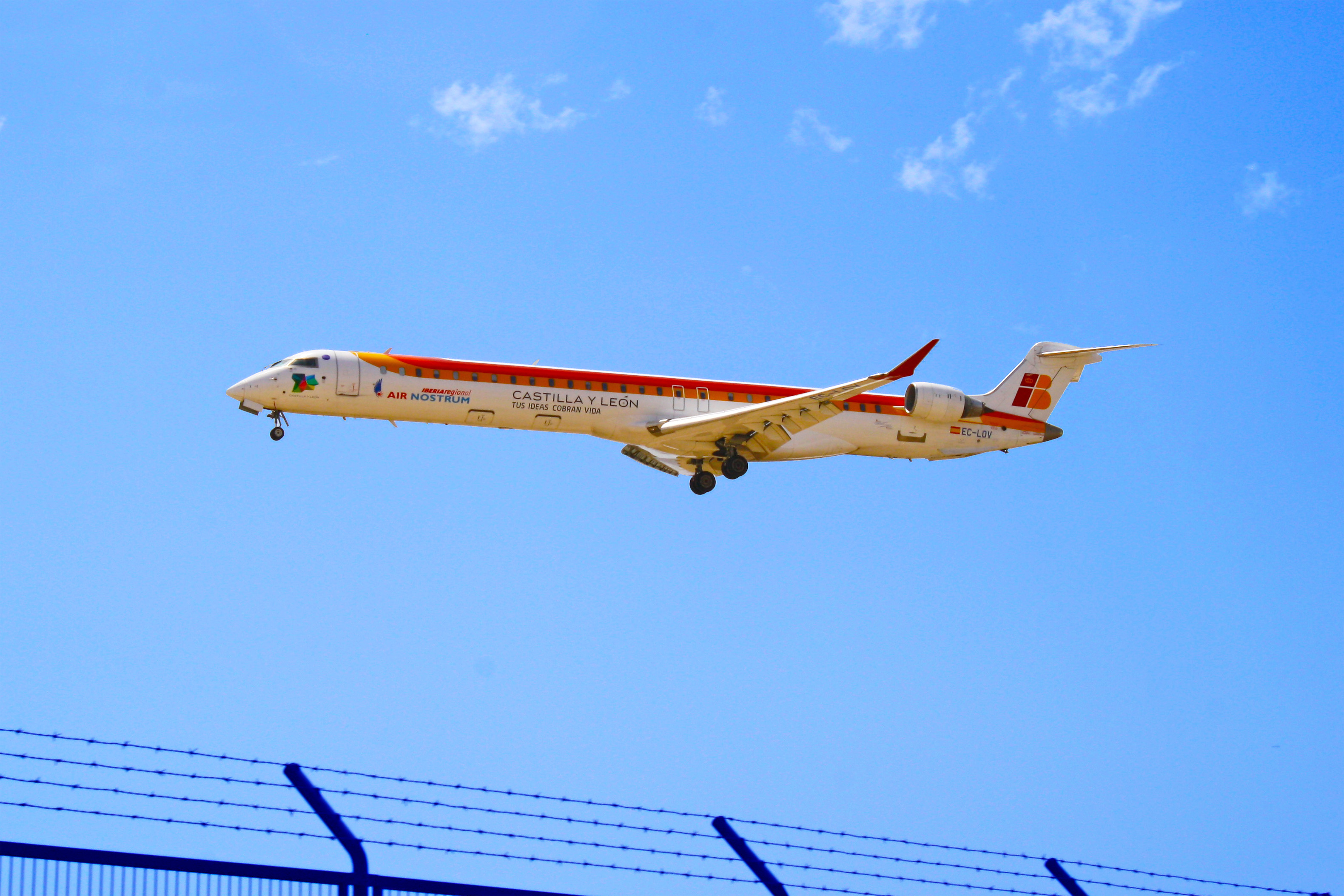 Canadair CL-600-2E25 aterrizando en el aeropuerto de Almería.